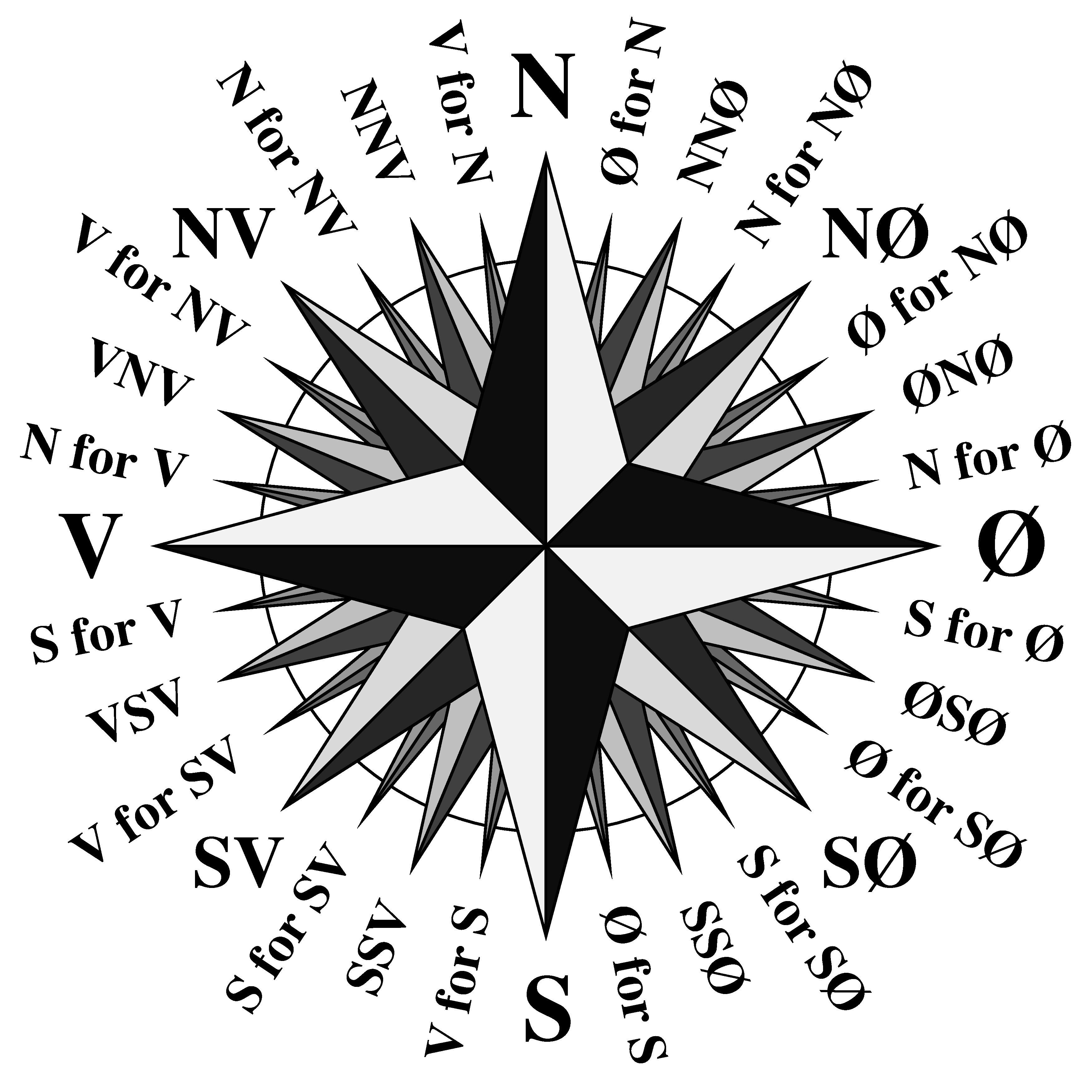 Bildet viser en kompassrose med 32 retninger, hver med forkortet norsk retningsangivelse.